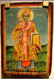 Икона на Свети Николай от църквата "Свети Илия" в Живине, Република Македония